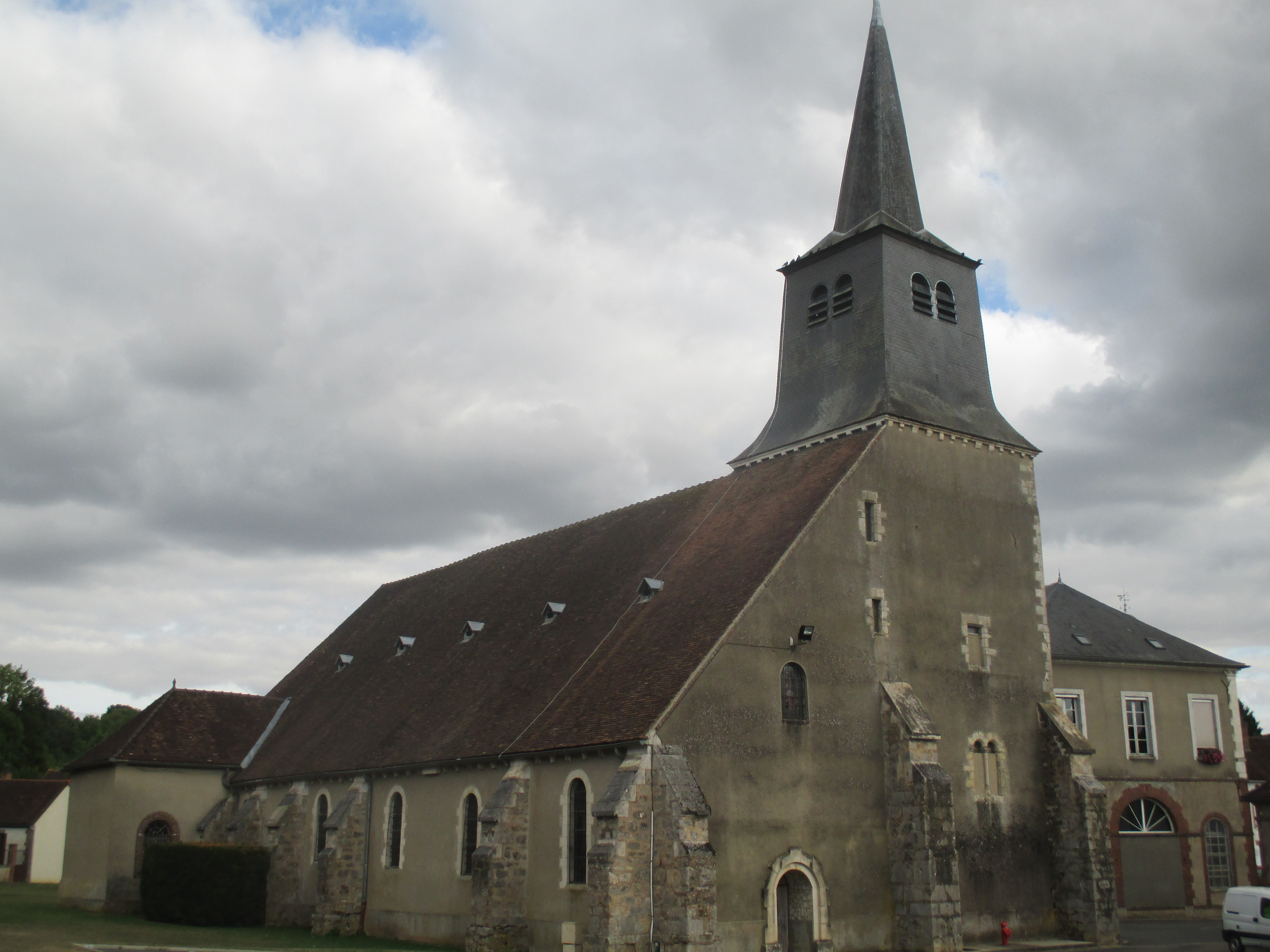 Vue de l'église de Cerisiers.